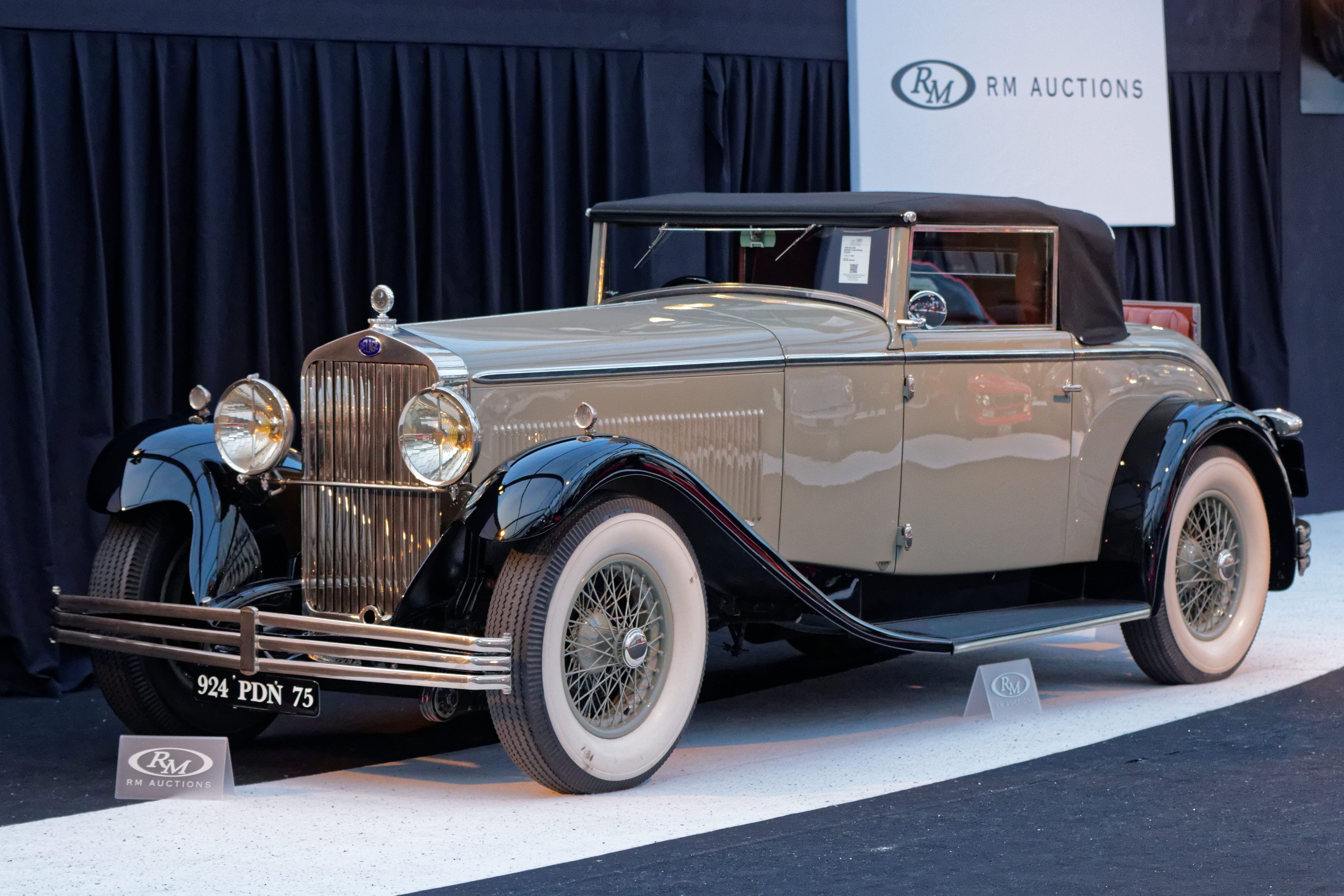 La vente aux enchères RM auctions aux pied des Invalides à Paris le 4 février 2015.